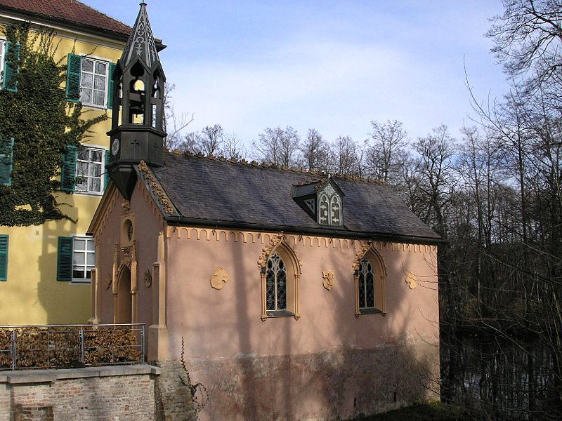 Schloss Unterwittelsbach bei Aichach (Landkreis Aichach-Friedberg, Bayerisch-Schwaben). Die Kapelle. Eigene Aufnahme, Februar. 2007 / Unterwittelsbach castle near Aichach (Bavaria, Germany). The chapel. Own photo, Feb. 2007